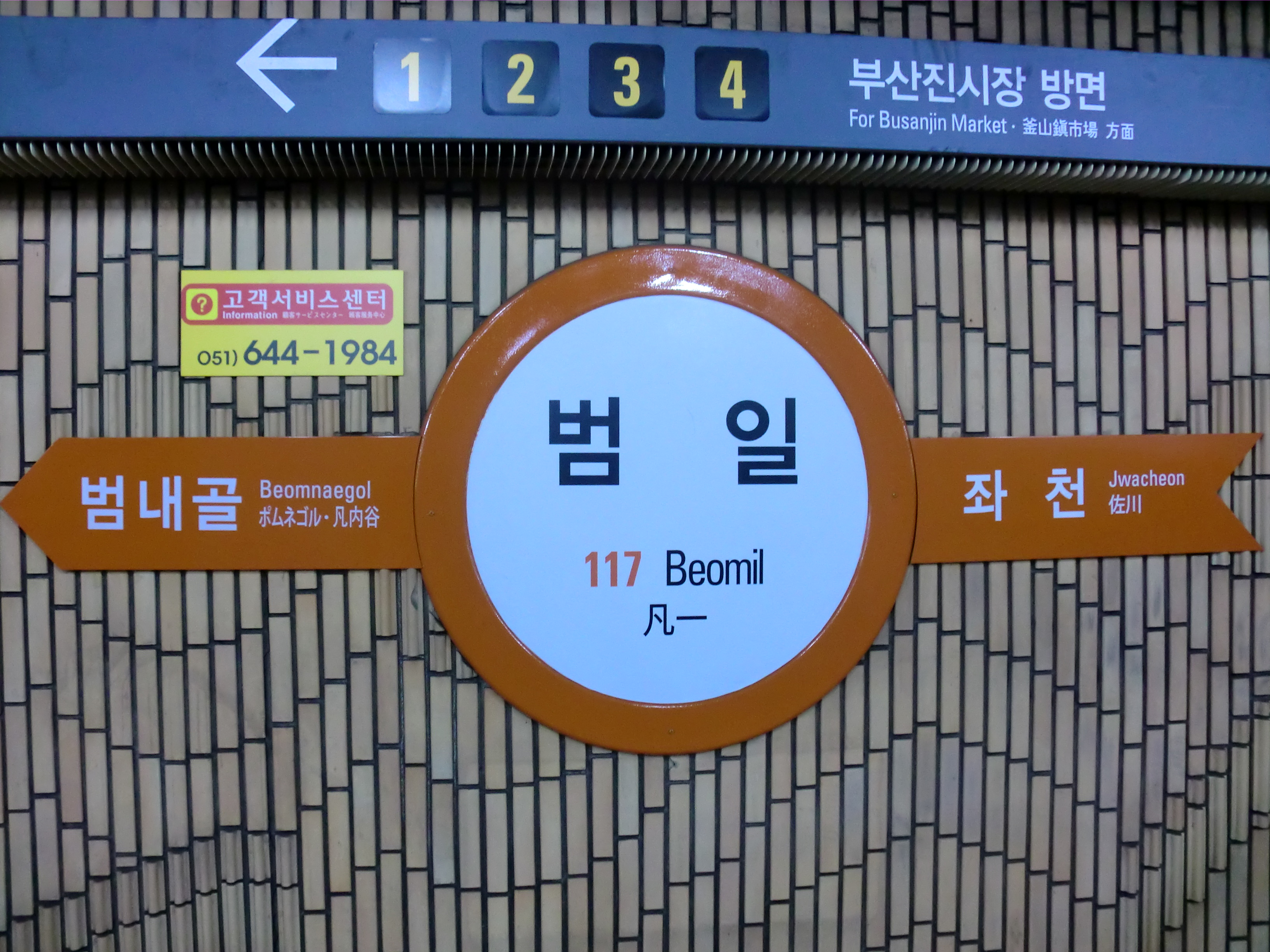 부산도시철도 1호선 범일역의 역명판